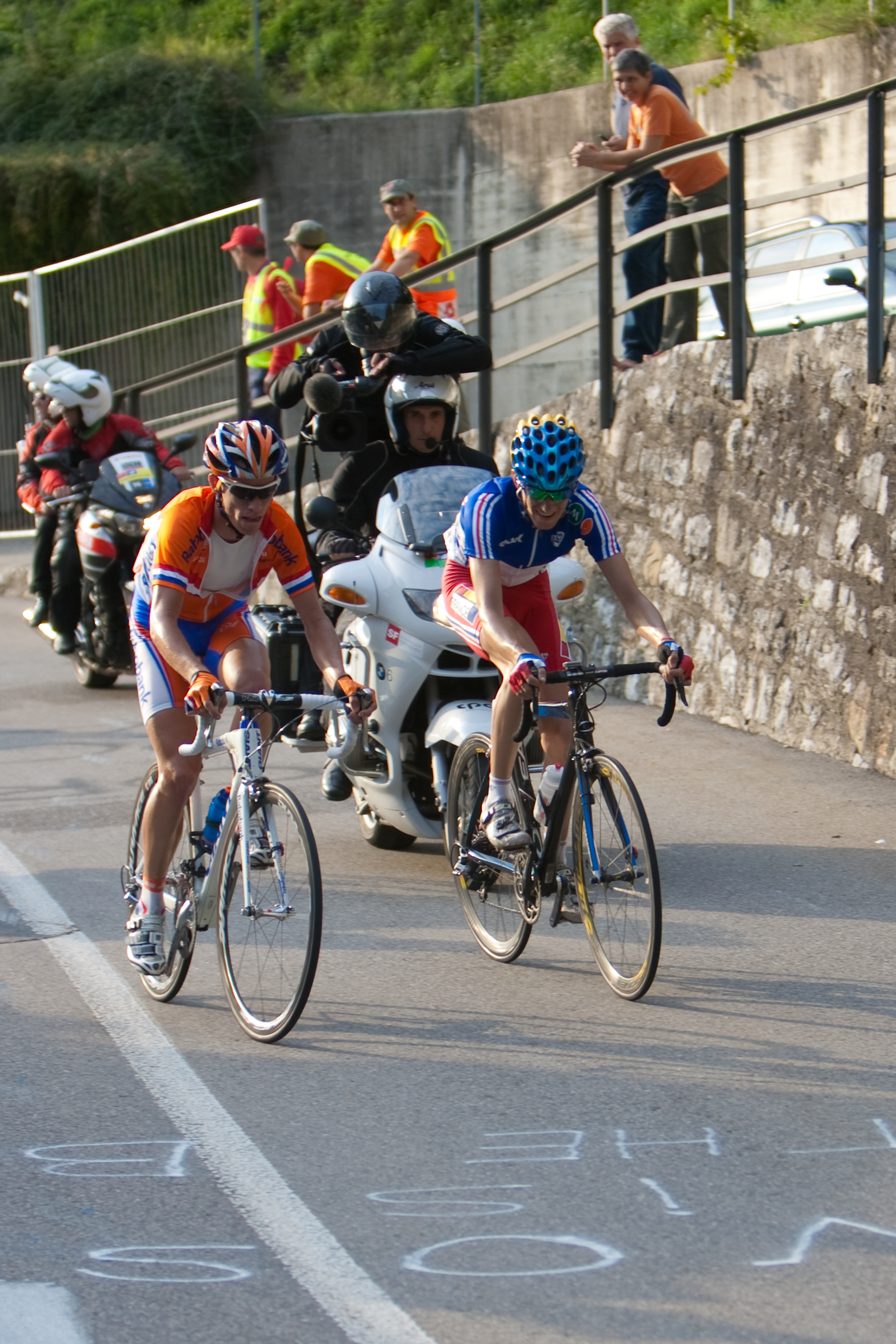 Mendrisio 2009. Championnat du monde de cyclisme des moins de 23 ans. Romain Sicard attaque dans le dernier tout.